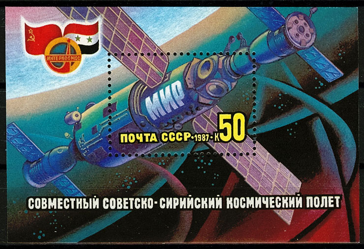 Почтовый блок СССР 1987 года из серии «Совместный советско-сирийский космический полет (22—30.07)». На марке и полях блока изображена космическая станция «Мир» и состыкованные с ней два космических корабля типа «Союз» (30 июля), эмблема «Интеркосмоса». Художник — Ю. Левиновский, тираж — 1,1 млн экз. Номер ЦФА — 5857.